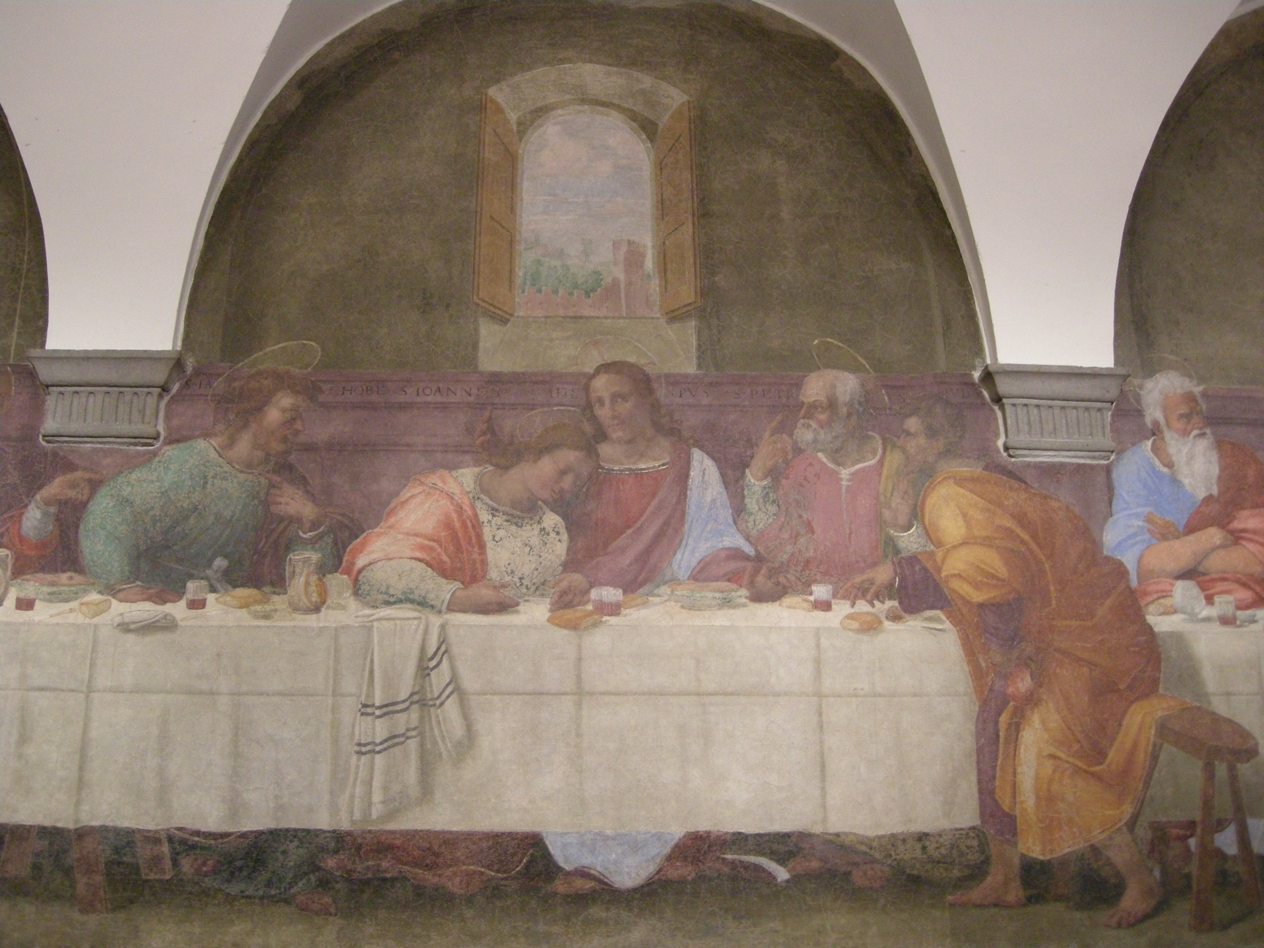 Monastero della calza, refettorio, ultima cena del franciabigio